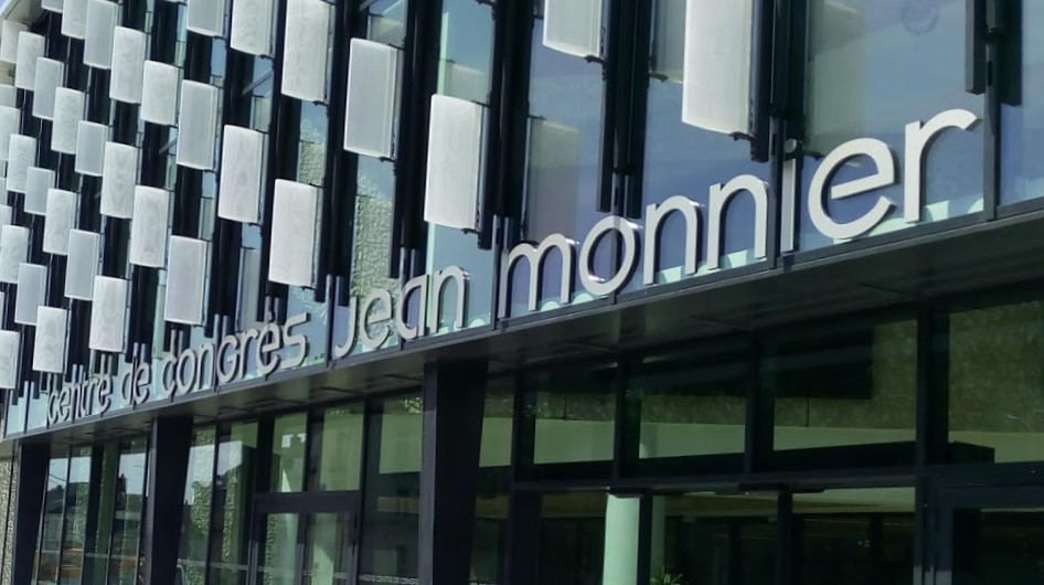 Panneau au Centre des congrès d'Angers